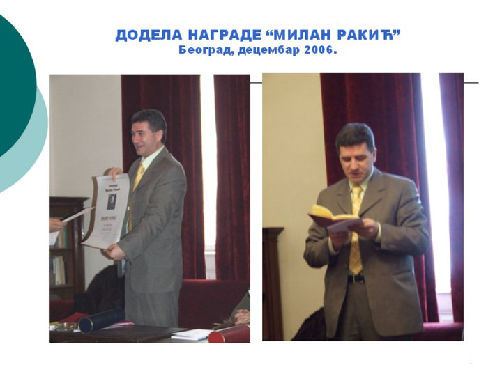 Milan Orlić - fotografija sa uručenja nagrade Milan Rakić (2006.)